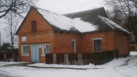 Публічно-шкільна бібліотека с.Тумень